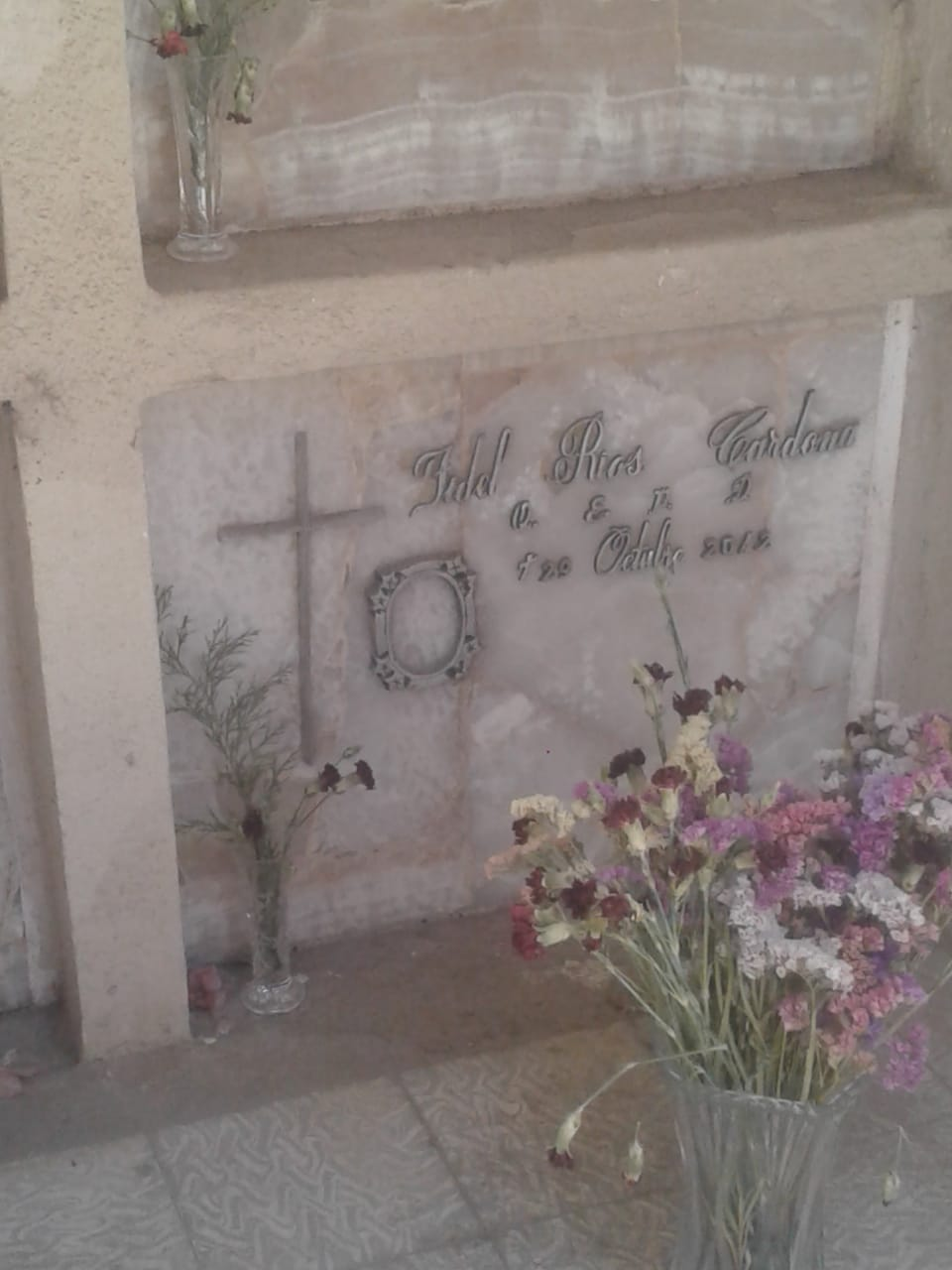 dentro del mausoleo